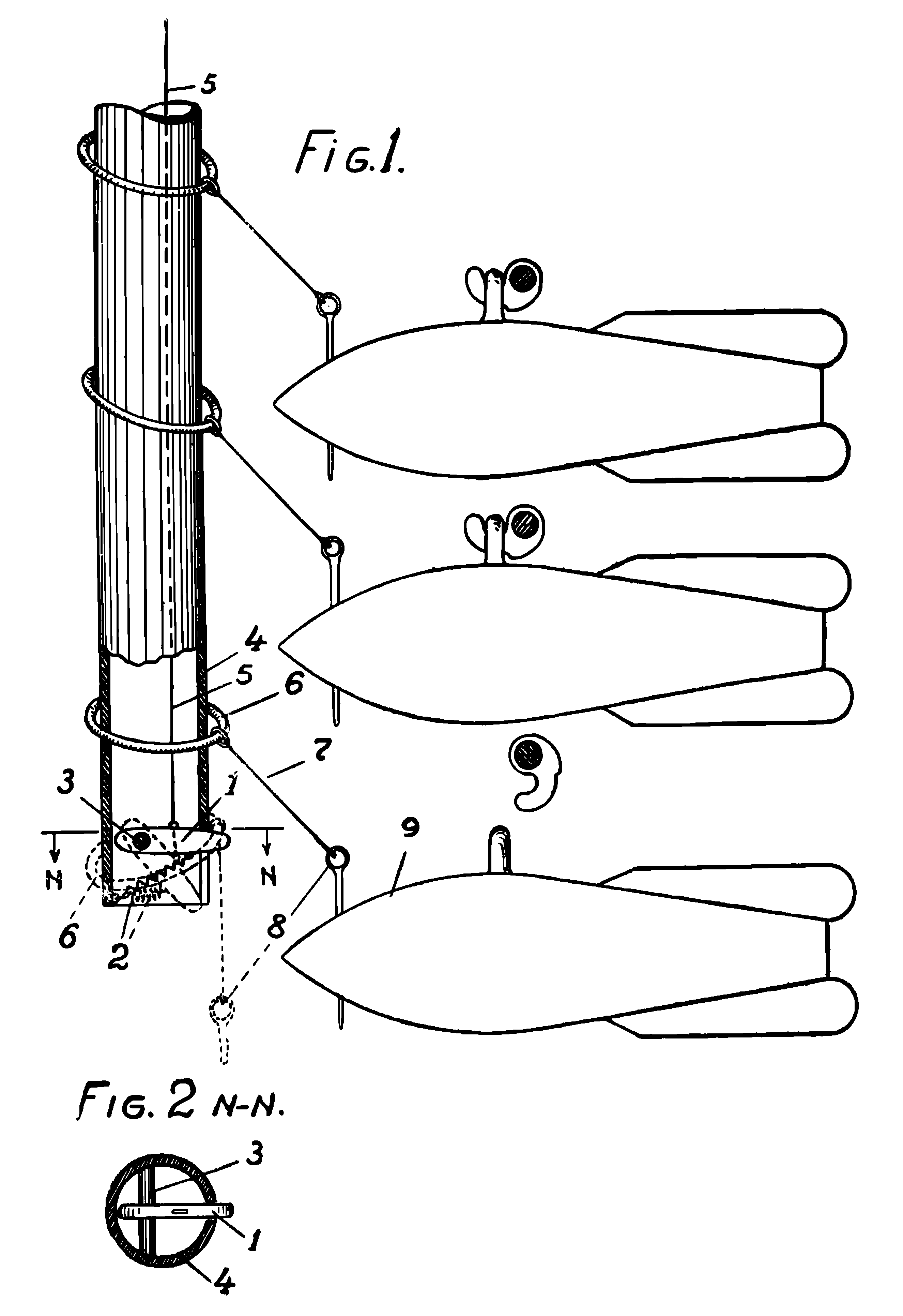 Rysunek z patentu udzielonego 26 września 1933 r. i dotyczącego urządzenia do zrzucania bomb lotniczych.